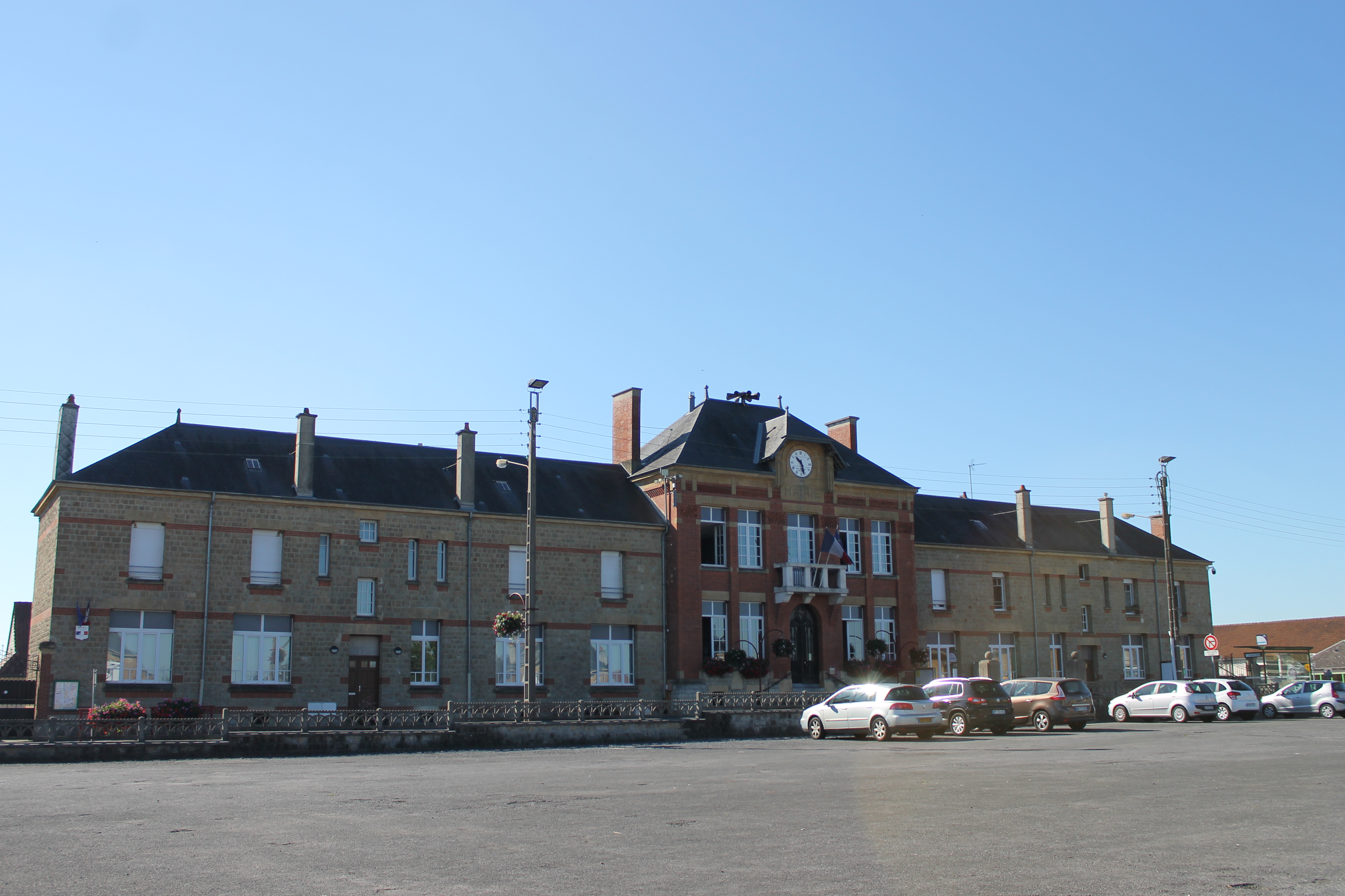 Mairie de Villers-Semeuse